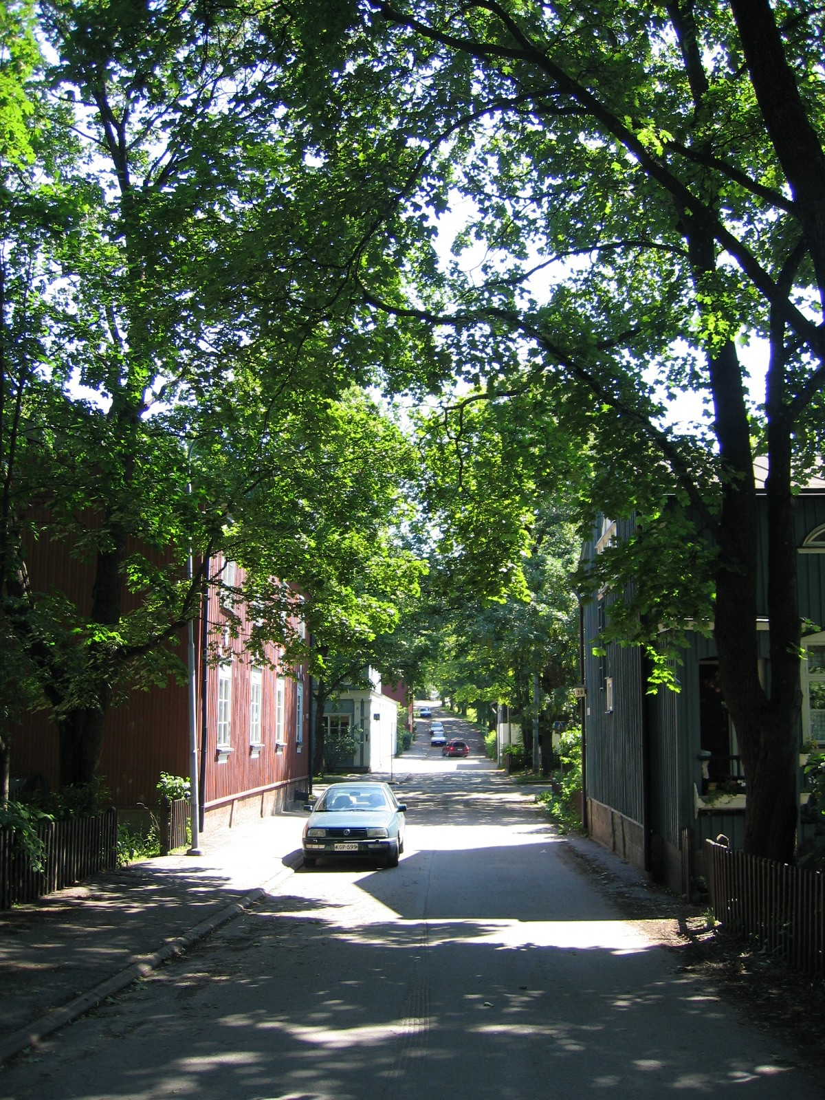 Metsolantie in Käpylä, Helsinki, Finland